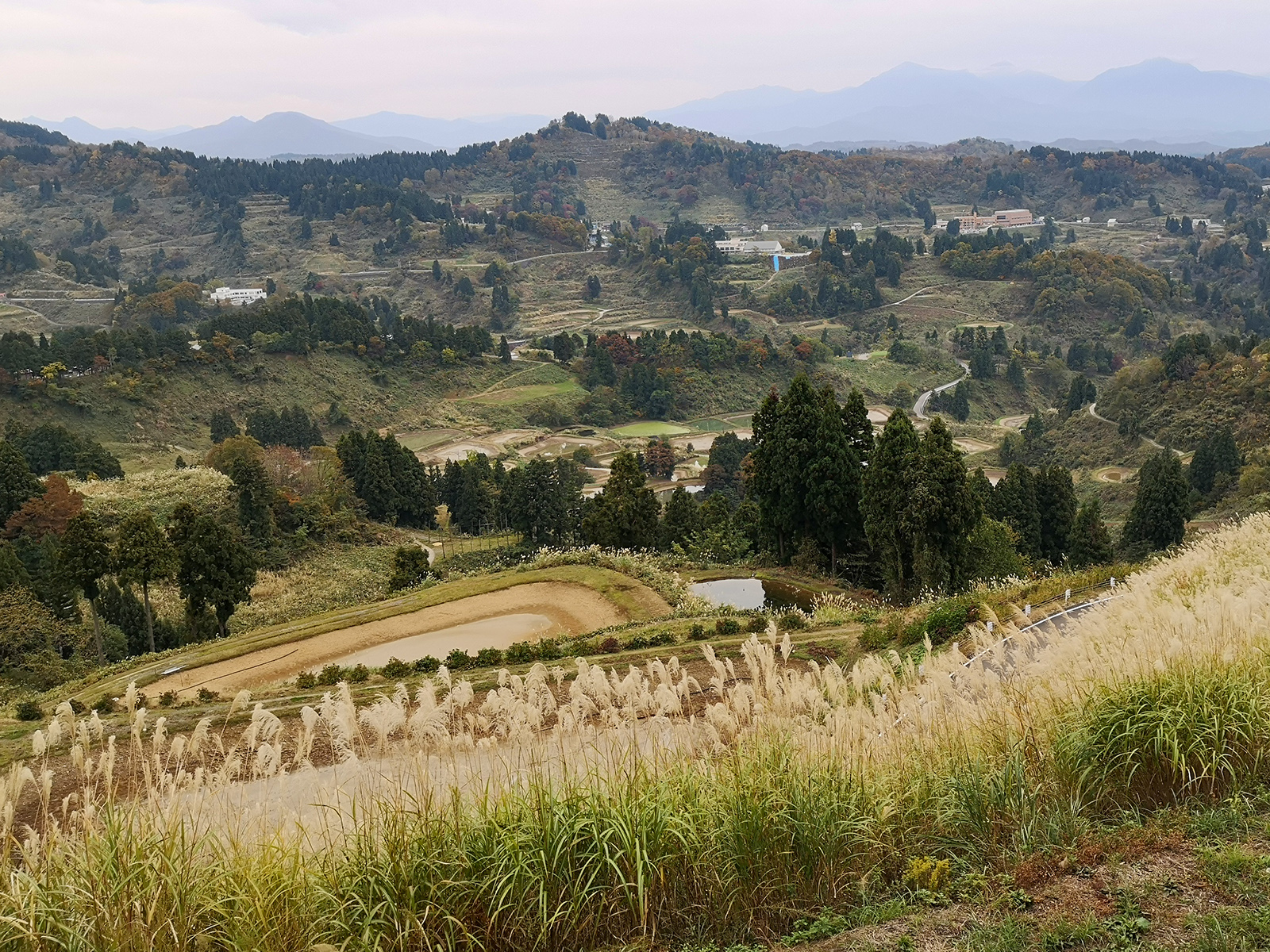 山間の傾斜地を利用した棚田が広がる